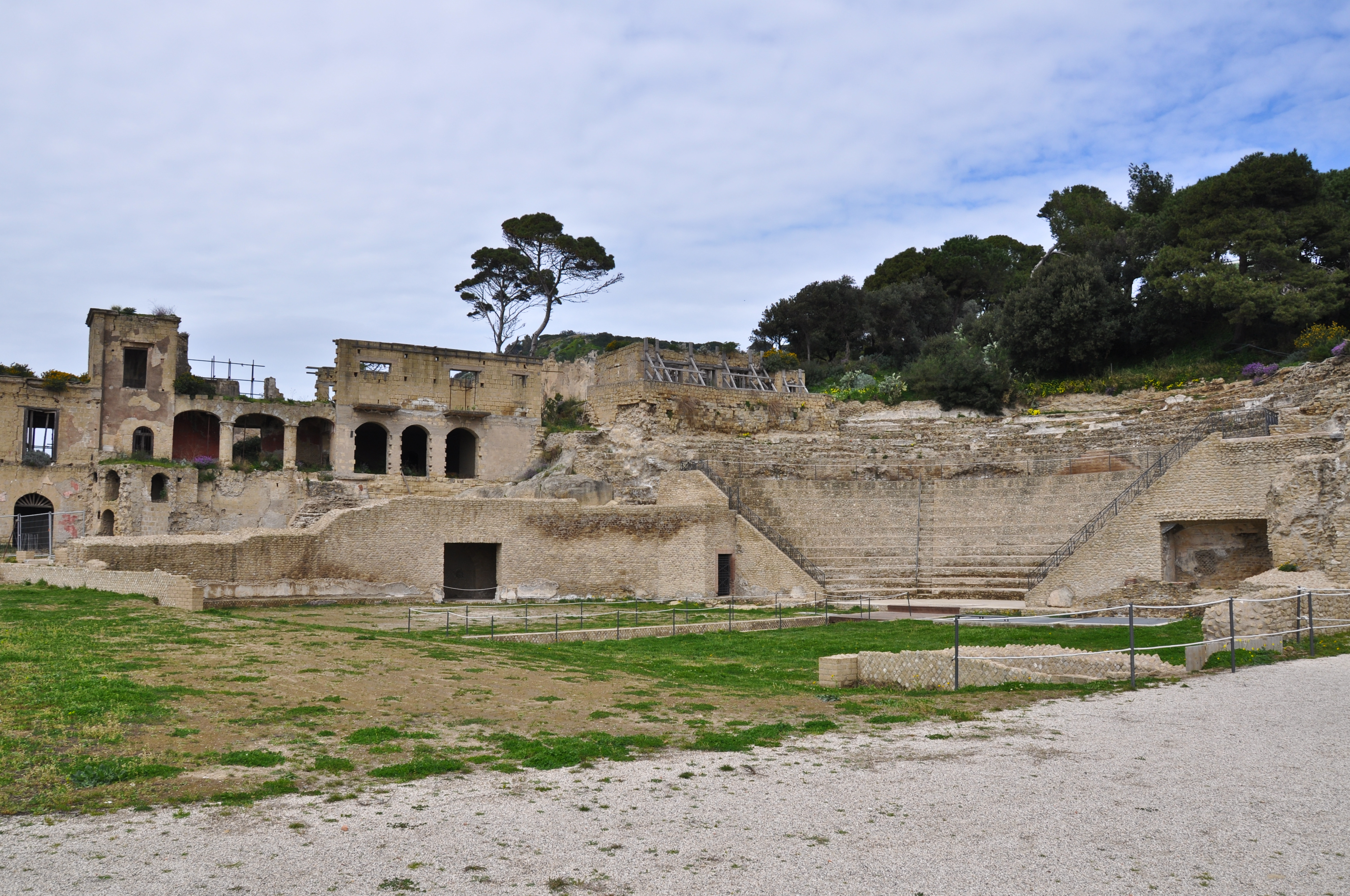 Napoli - Parco archeologico del Pausilypon